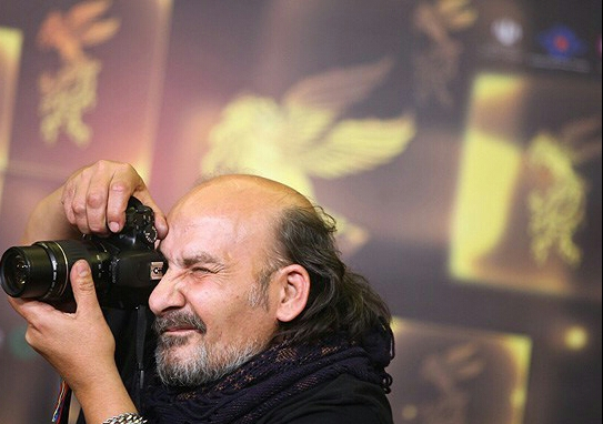 محمدرضا داوودنژاد - بهمن ۱۳۹۱